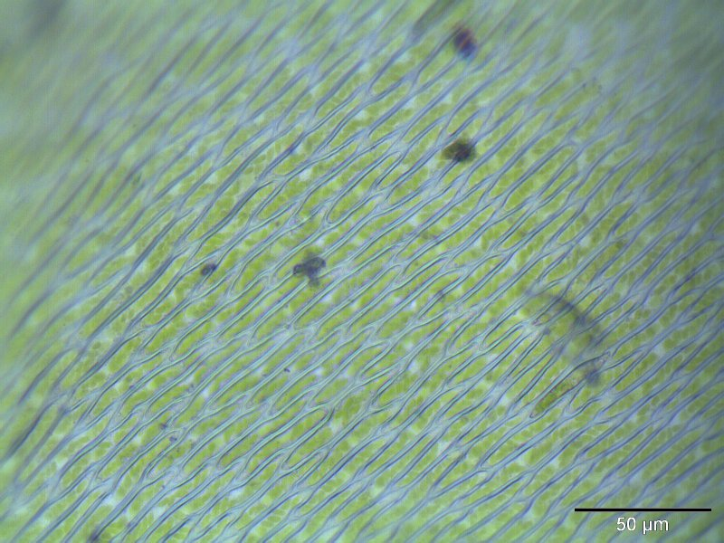 Geschwollenes Zypressen-Schlafmoos (Hypnum lacunosum), Laminazellen, Vergrößerung: 400x